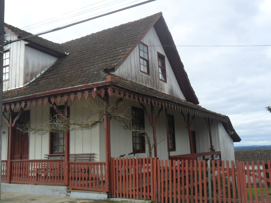 Casa em Paraguaçu, Itaiópolis, Santa Catarina